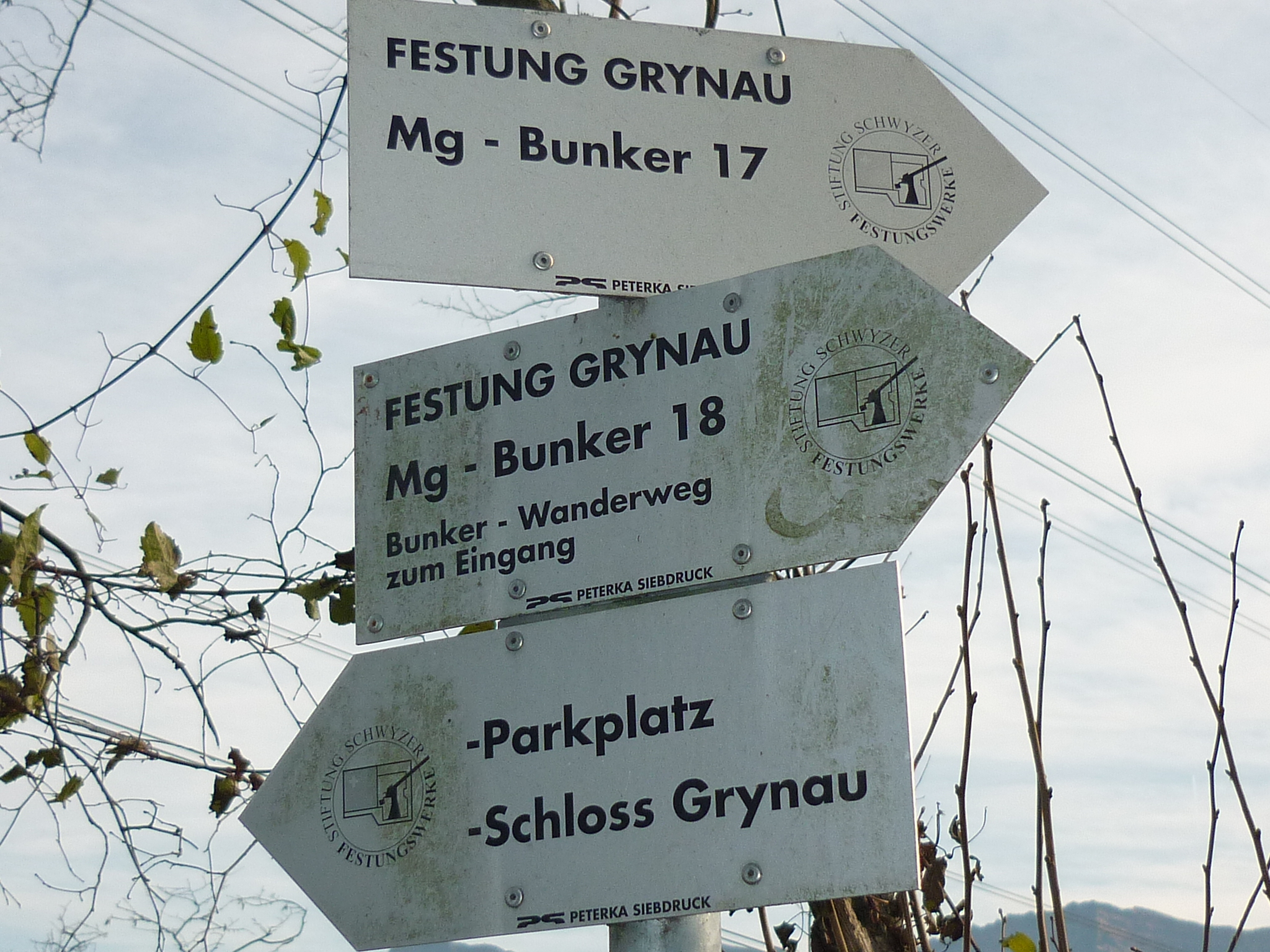 Sperrstelle Grynau SZ, Schweiz